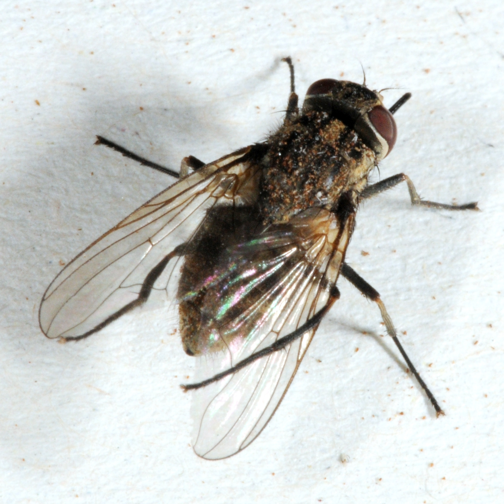 Stomoxys calcitrans, Marburg, Deutschland